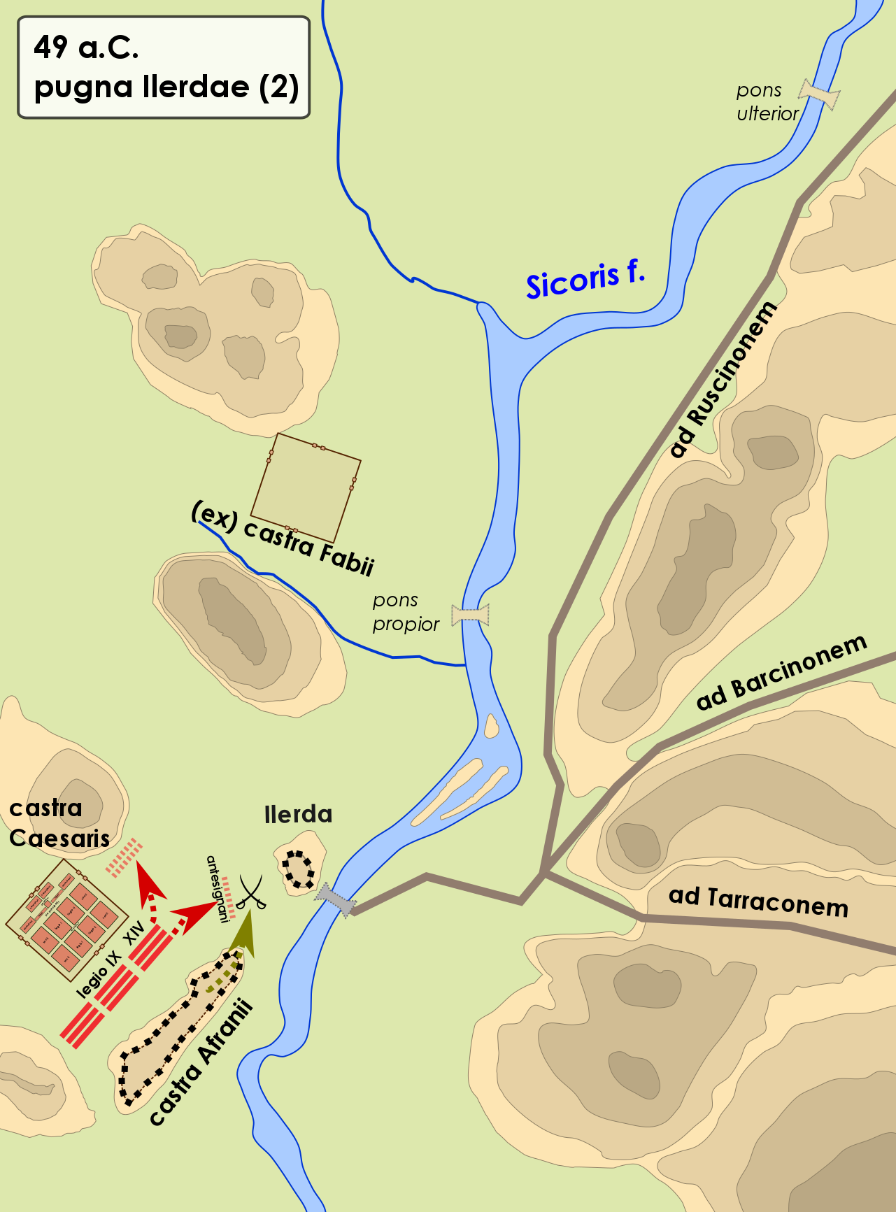 Battaglia davanti a Ilerda dopo l'arrivo di Cesare (49 a.C.)